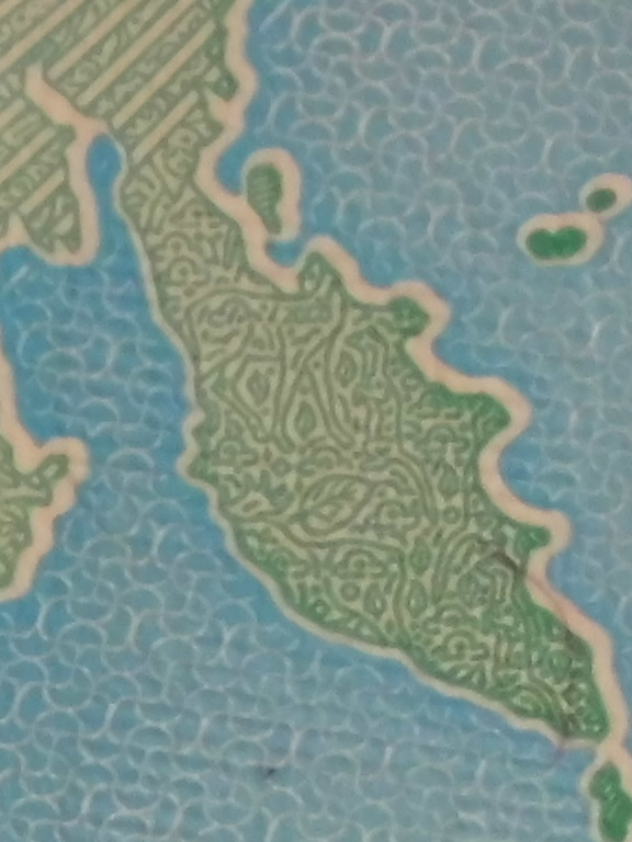 2000 российских рублей образца 2017 года. Реверс, справа. Микротекст (2000), микрорисунки животных и растений